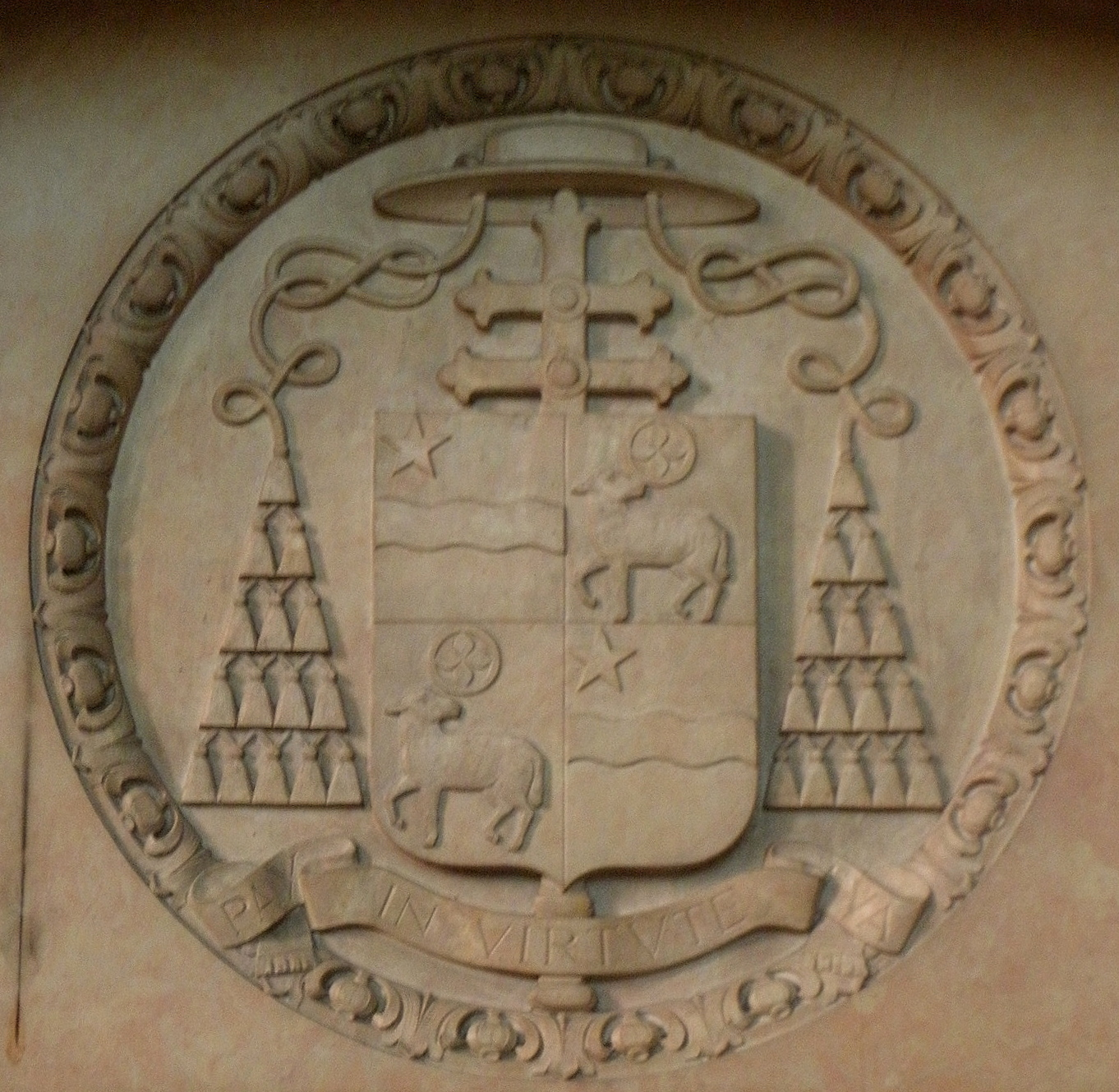 Tombeau du cardinal Pierre Paulin Andrieu (1849-1935) en la cathédrale Saint-André de Bordeaux (33). Armes du prélat. Sculpteur : Charles Louis Malric (1872-1942).